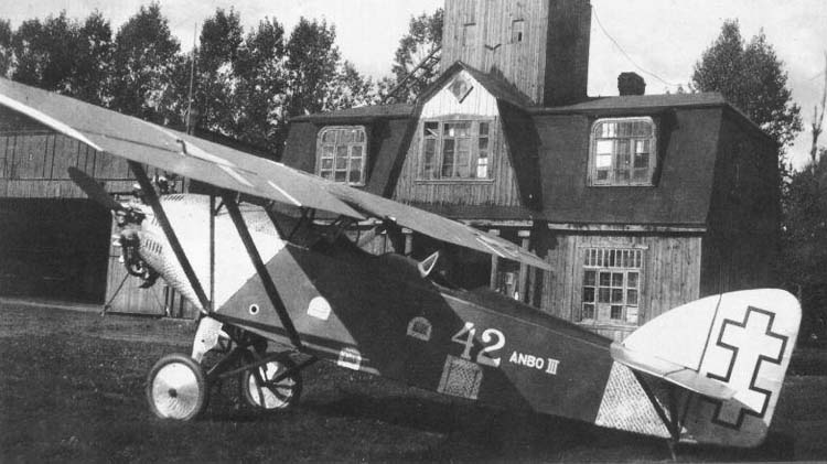 Litewski samolot szkolny ANBO-III.